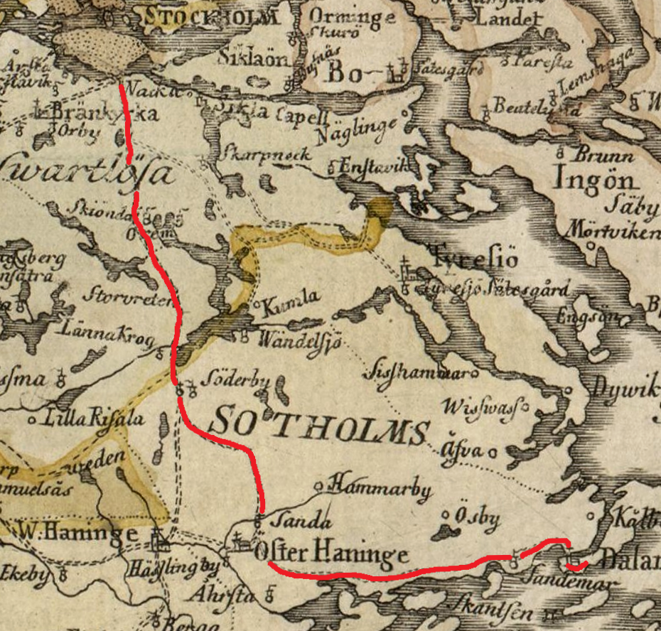 Del av 1772 års vägkarta över Stockholm med omgivningar med Dalaövägen